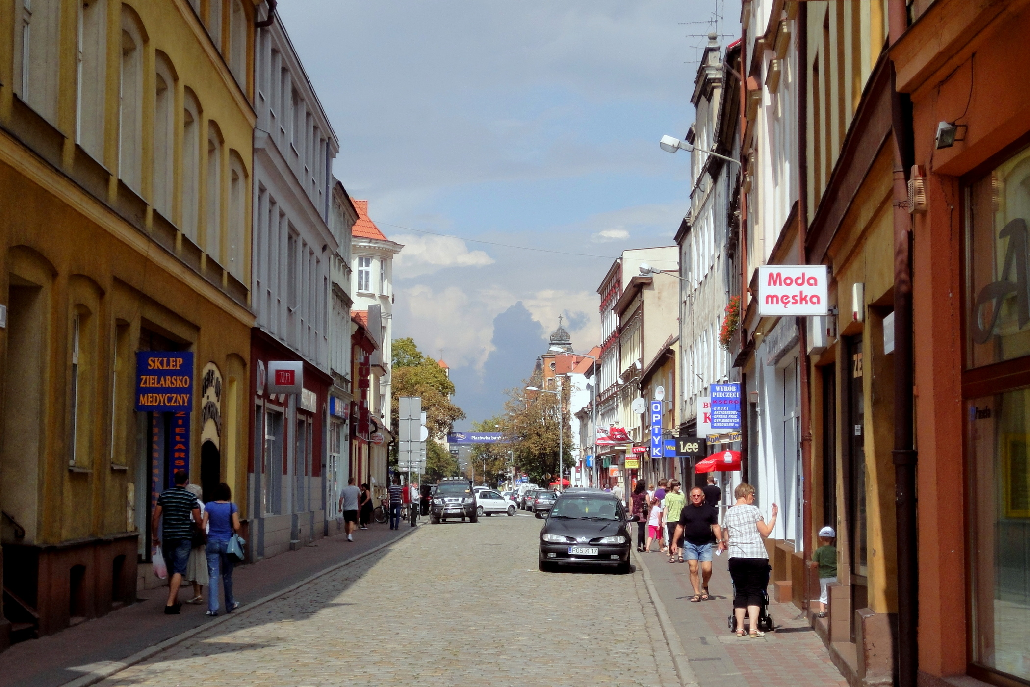 Ostrów Wlkp., ul. Raszkowska